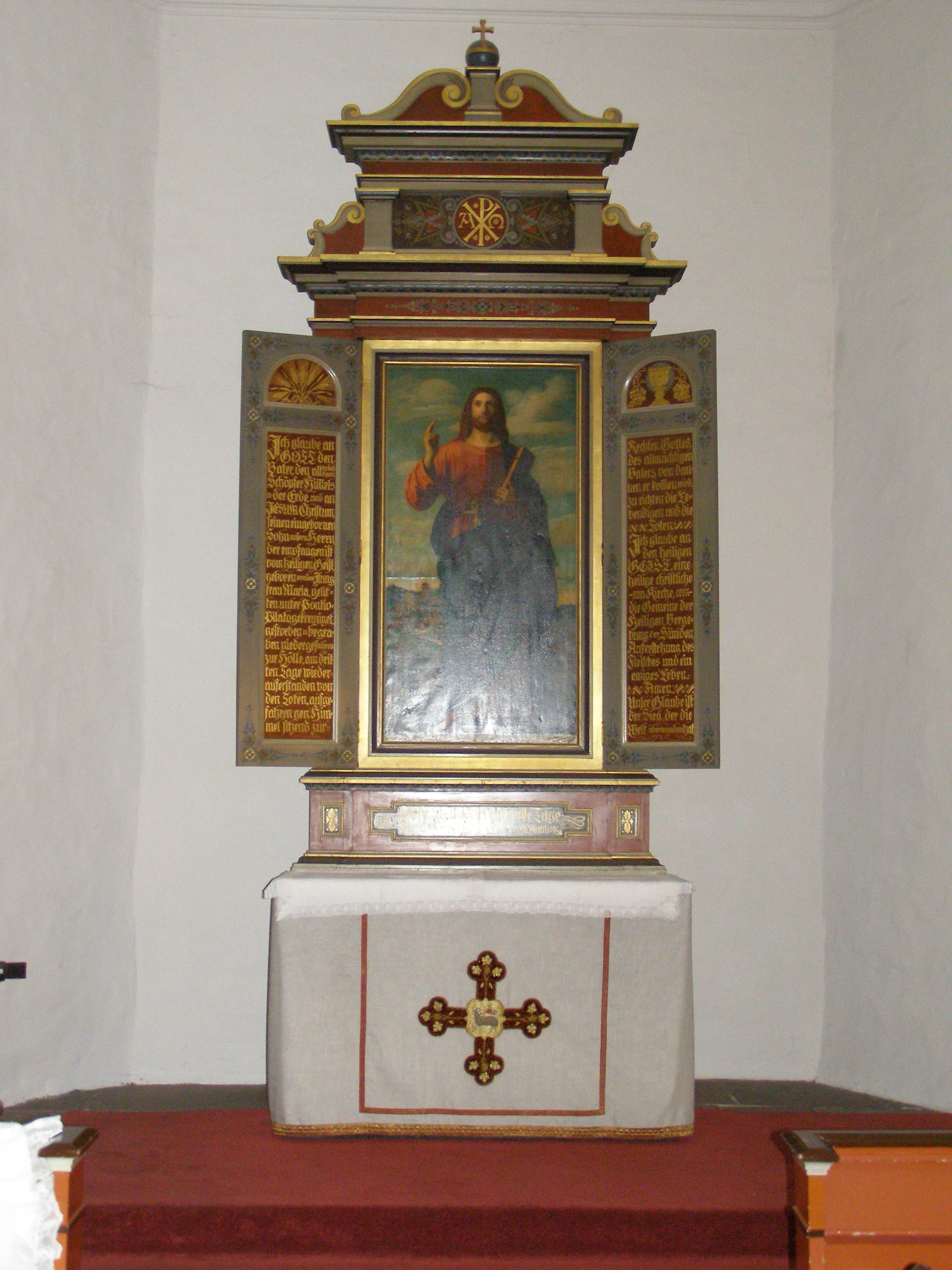 „Böhmisch-Rixdorf“ in Berlin, Bethlehem Kirch („Rixdorfer Dorfkirche“) „Český Rixdorf“ v Berlíně, Betlémský kostel („Rixdorfský vesnický kostel“) „Bohemian Rixdorf“ in Berlin, Bethlehem Curch („Rixdorf village church“)